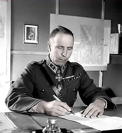 Jatkosodan 10. divisioonan komentaja kenraalimajuri Jussi Sihvo.